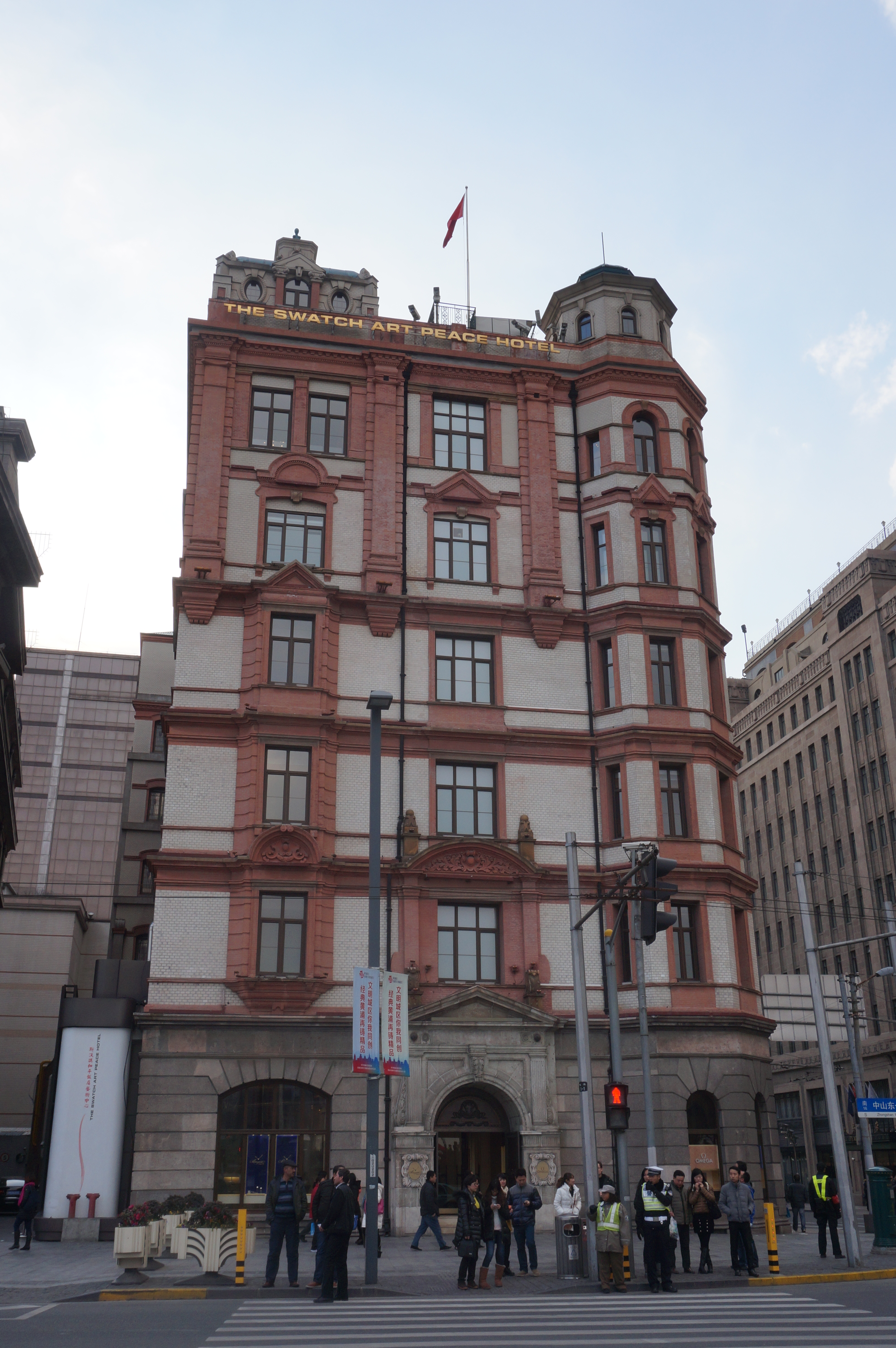 外滩汇中饭店